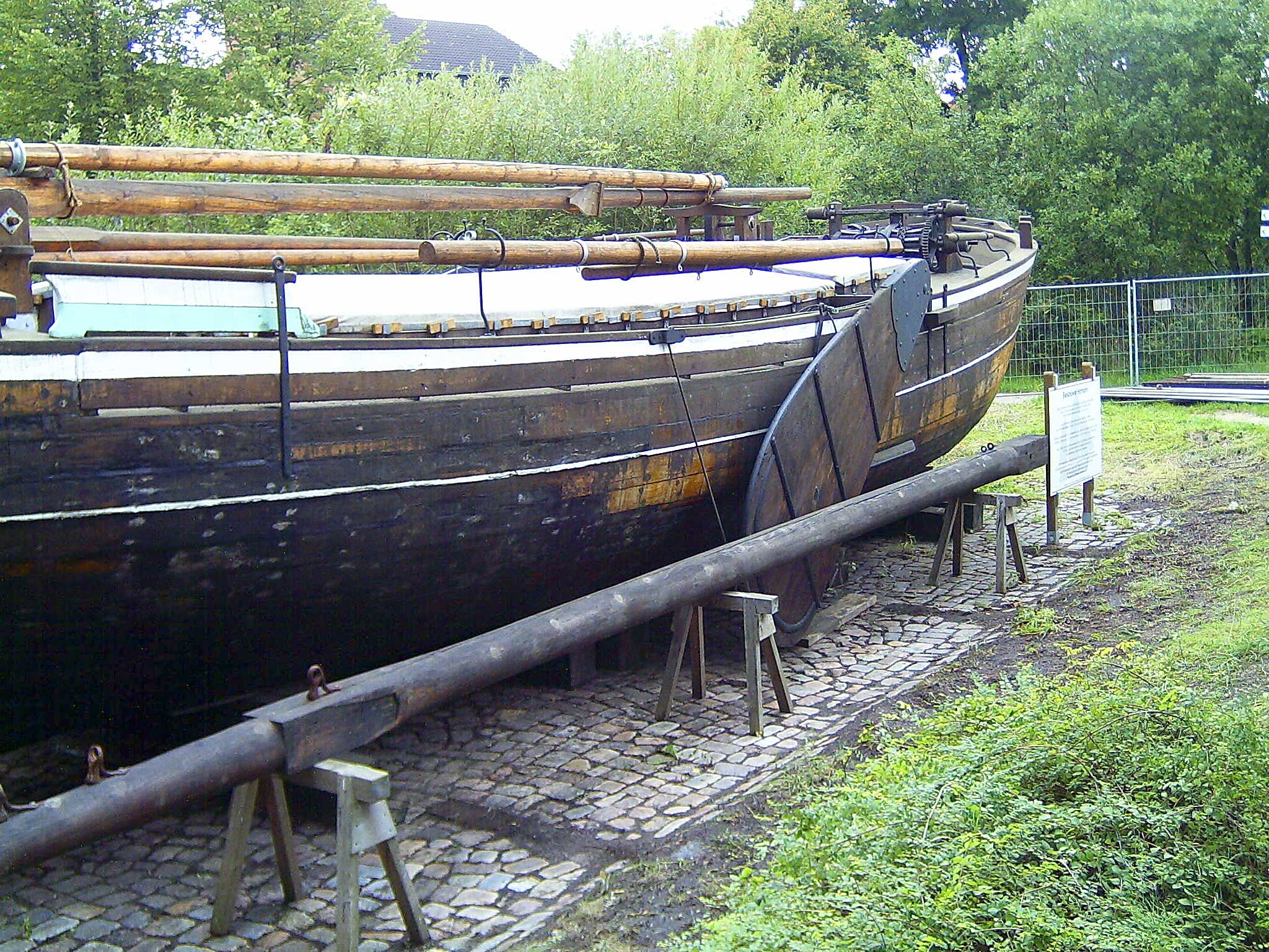 Der letzte hoelzerne Frachtewer am alten Standort in Itzehoe, der neue Ausstellungsort wird das Hafenmuseum Hamburg sein.